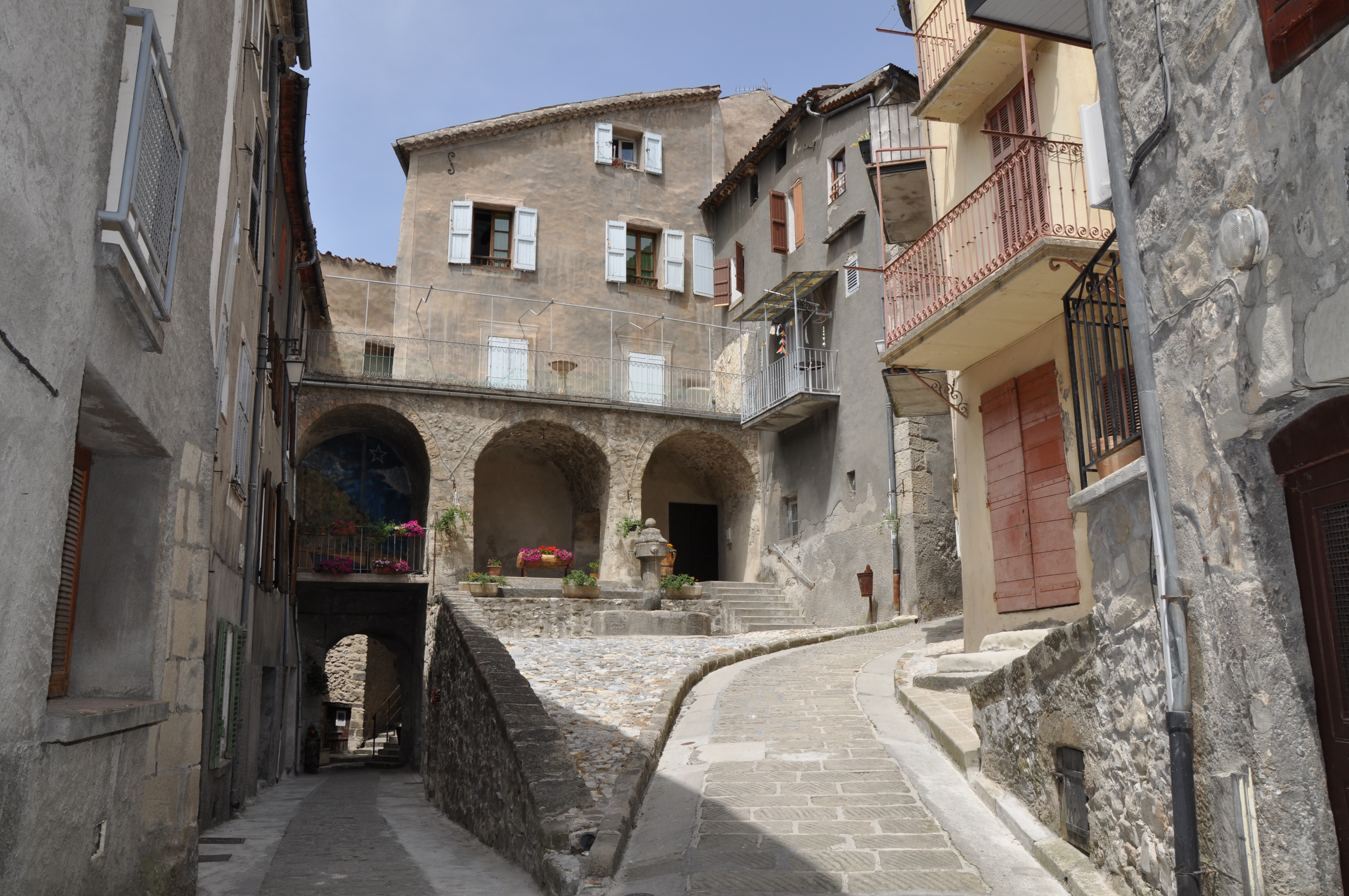 Annot et ses maisons médiévales